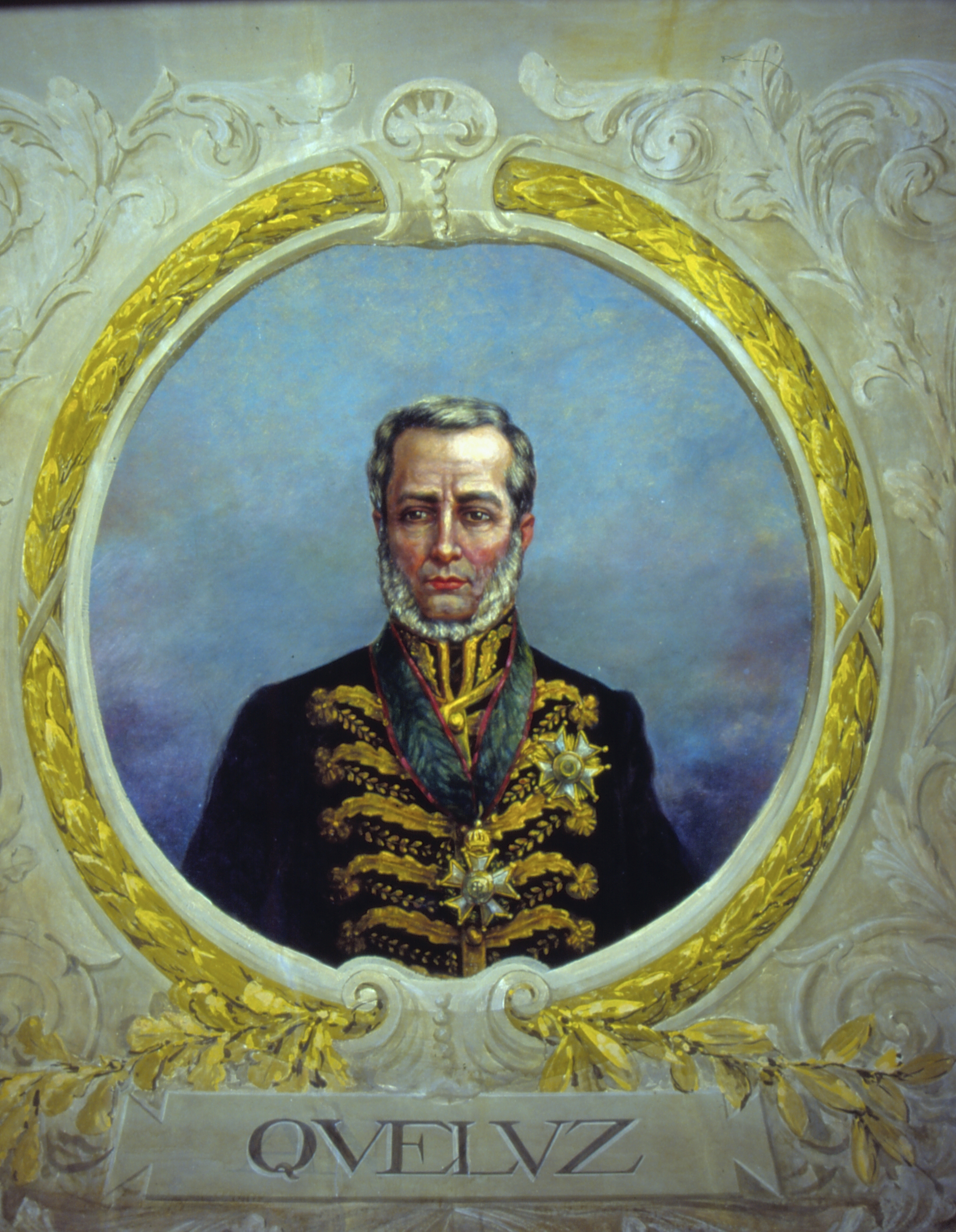 Obra que integra o acervo do Museu Paulista da USP. Coleção Fundo Museu Paulista - FMP